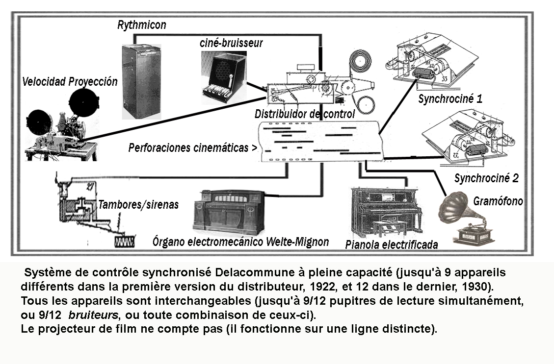 Système de synchronisation Delacommune 1923